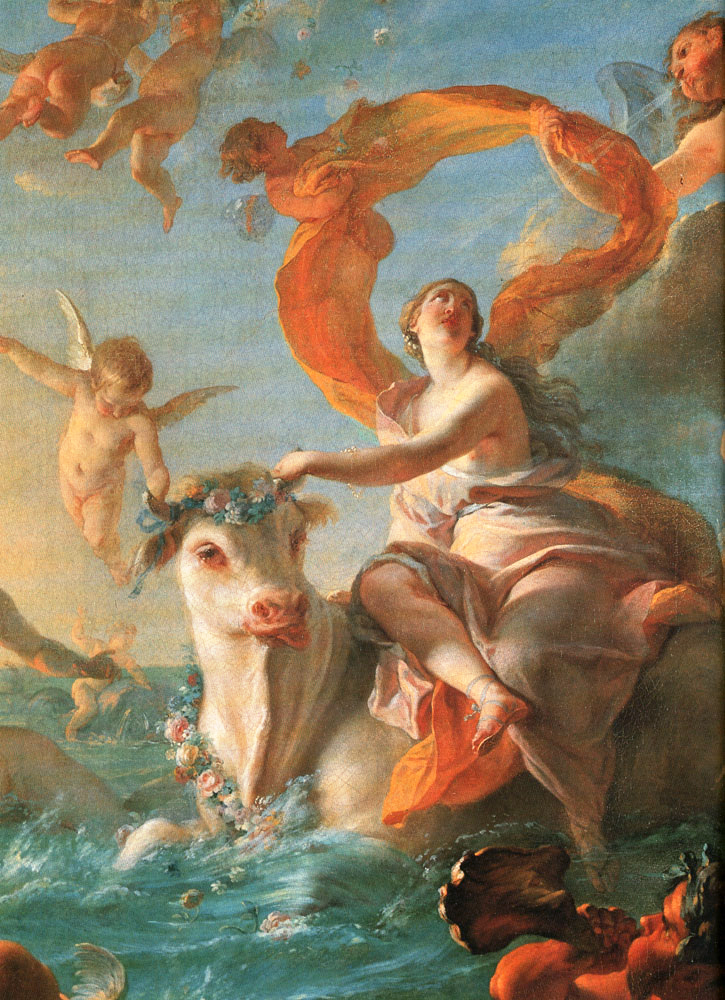 detail